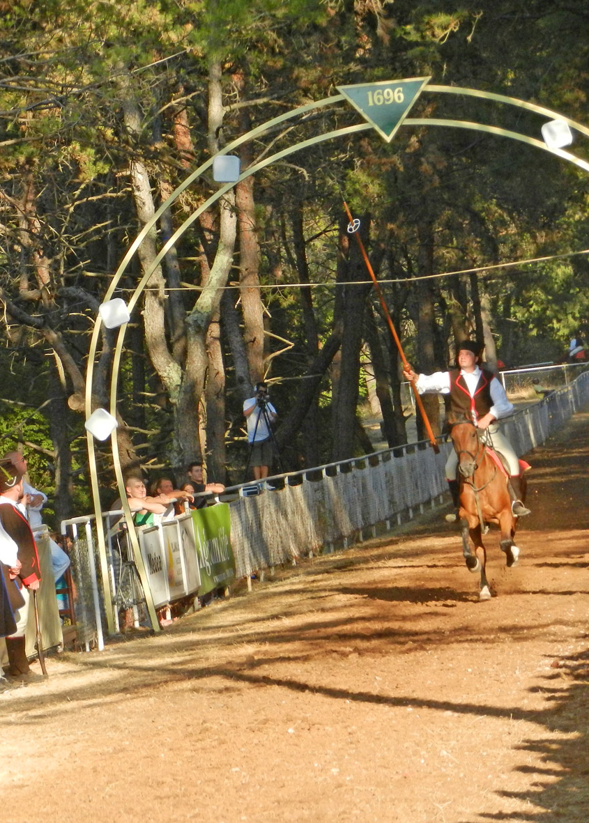 Samuel Štoković na konju Šunda Bunda slavodobitnik je 37. Trke na prstenac održane u Barbanu u Istri u nedjelju 19. kolovoza 2012. Pogađa "u sridu".